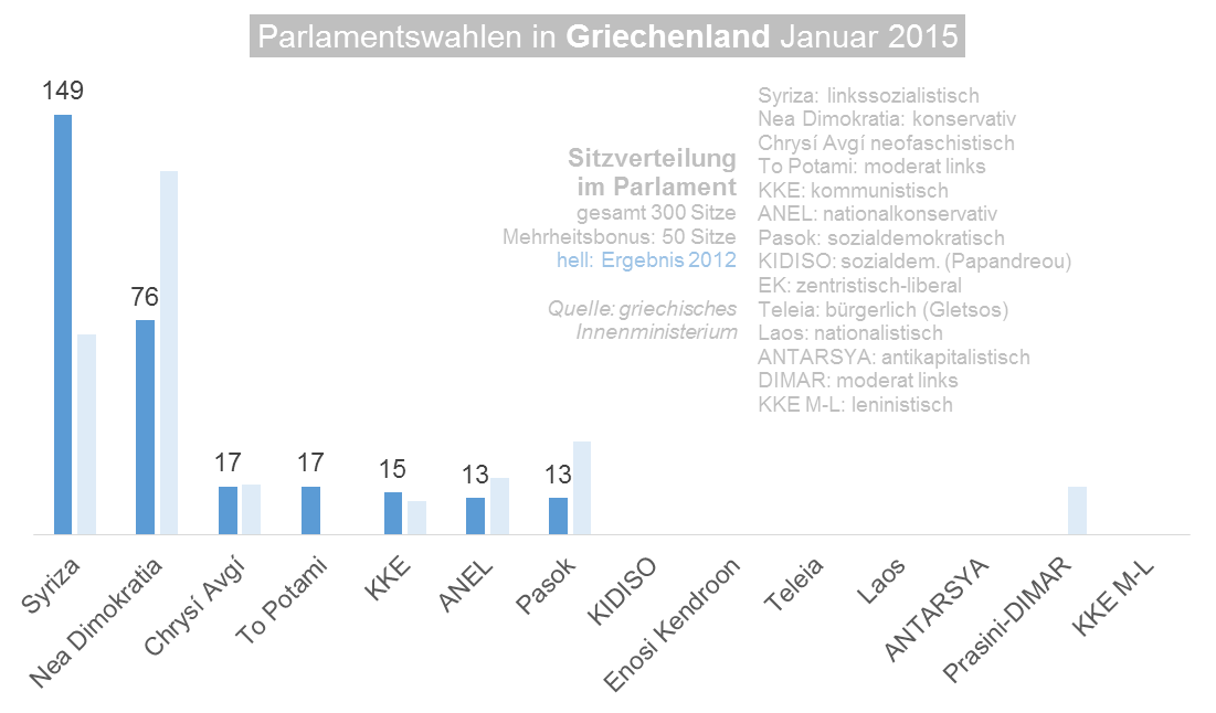 Wahlergebnisse bei den Parlamentswahlen in Griechenland 2015 / Mandate